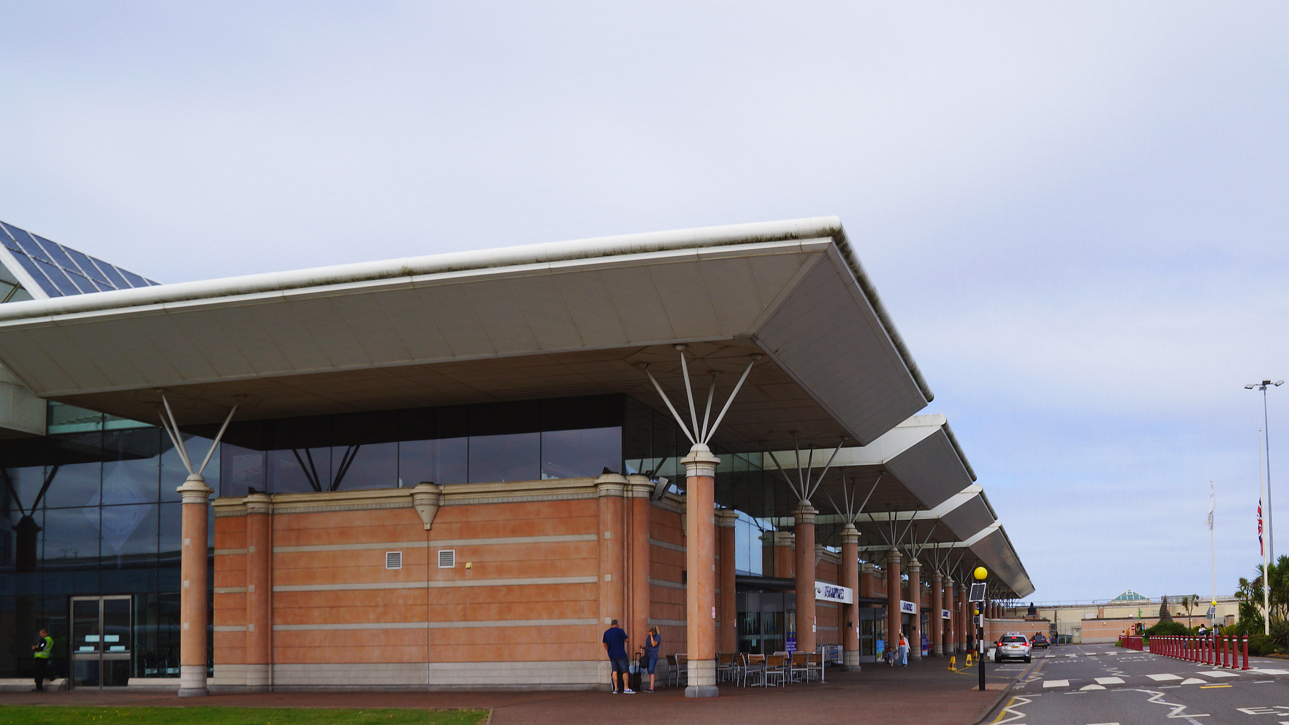 Terminal Jersey Airport Abfertigungsgebäude Flughafen Jersey Channel Islands Great Britain Großbritannien Foto Wolfgang Pehlemann DSC04977